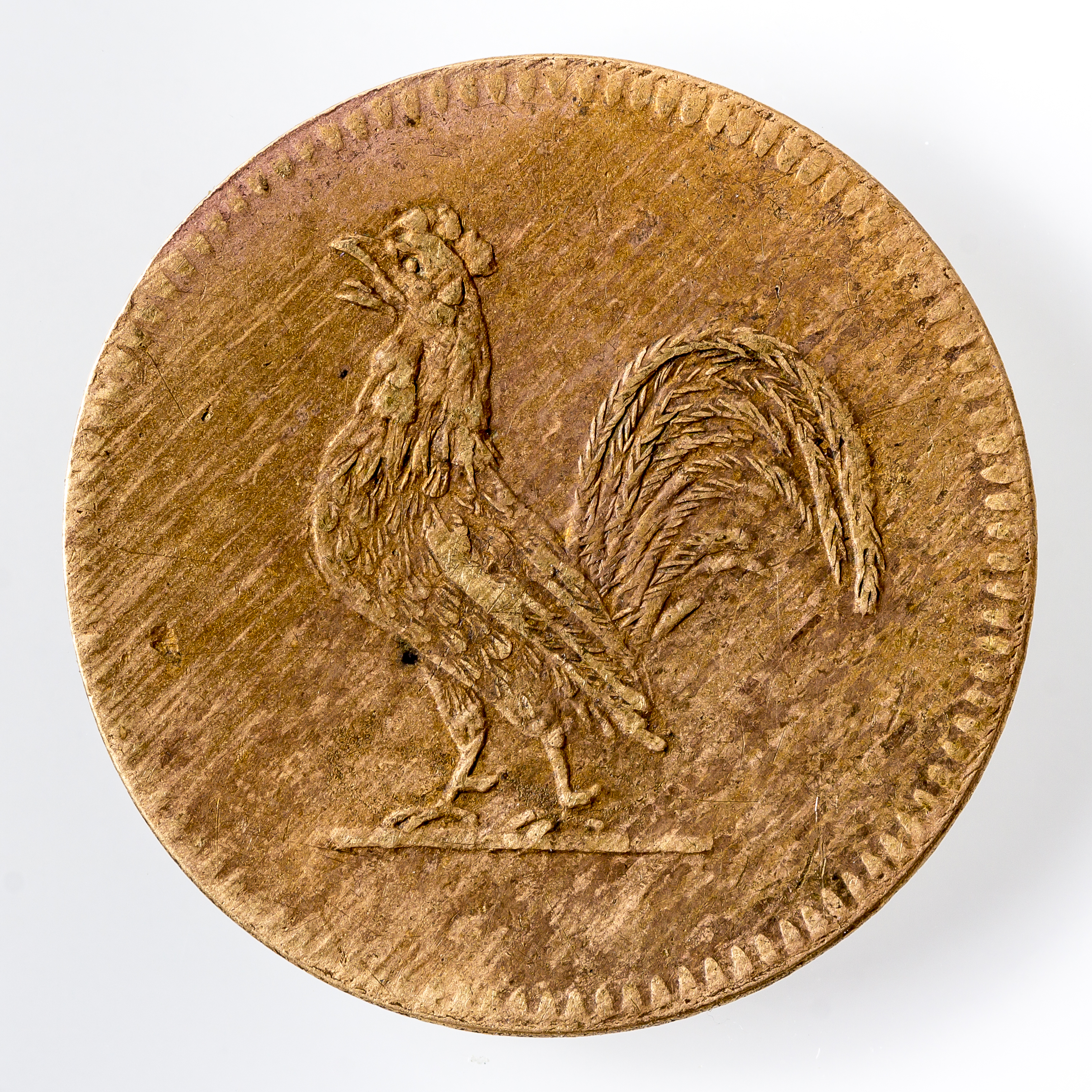 Judenpfennig 1 Pfenning 1822